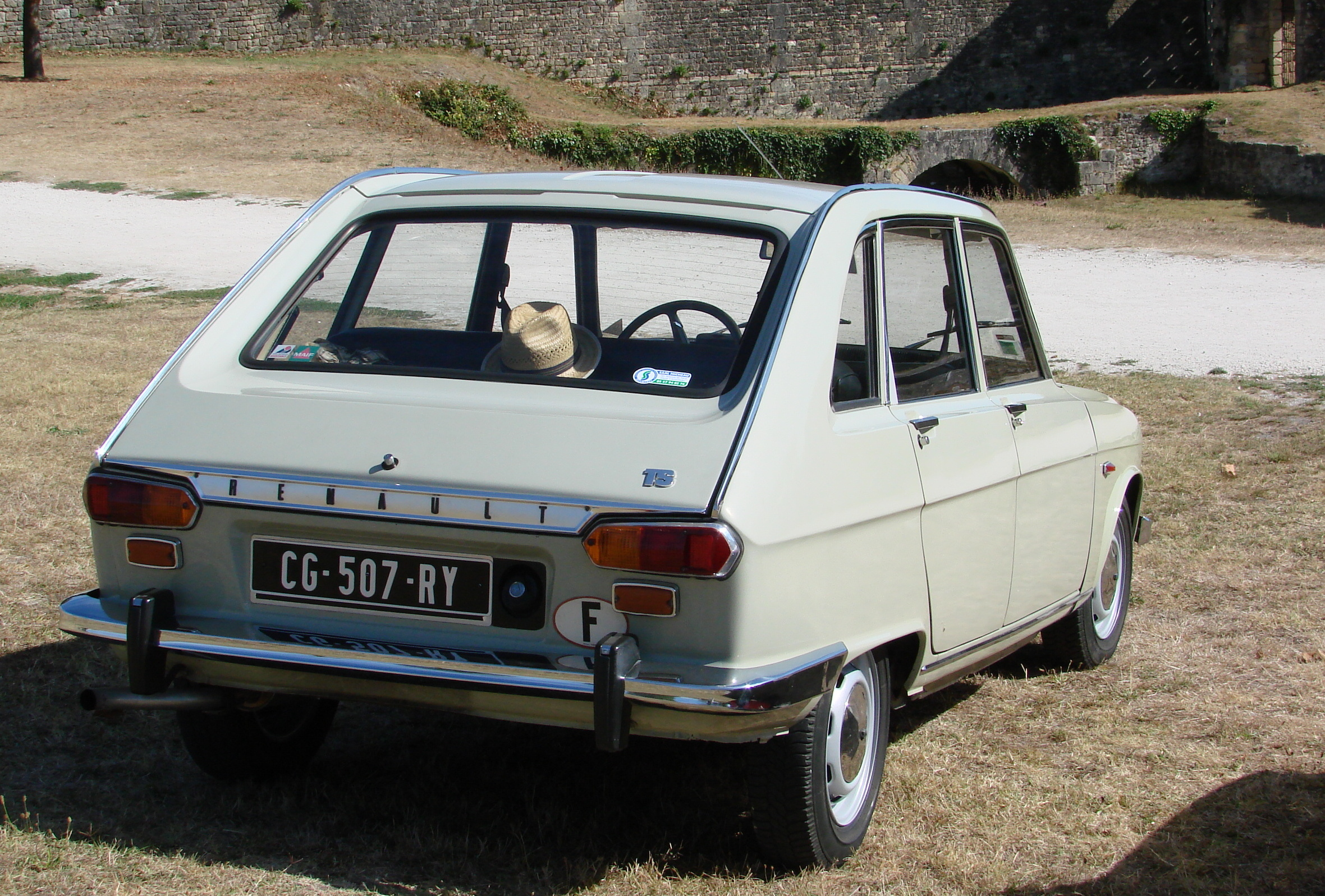 Renault 16 TS en 2012 aux journées du patrimoine de Blaye